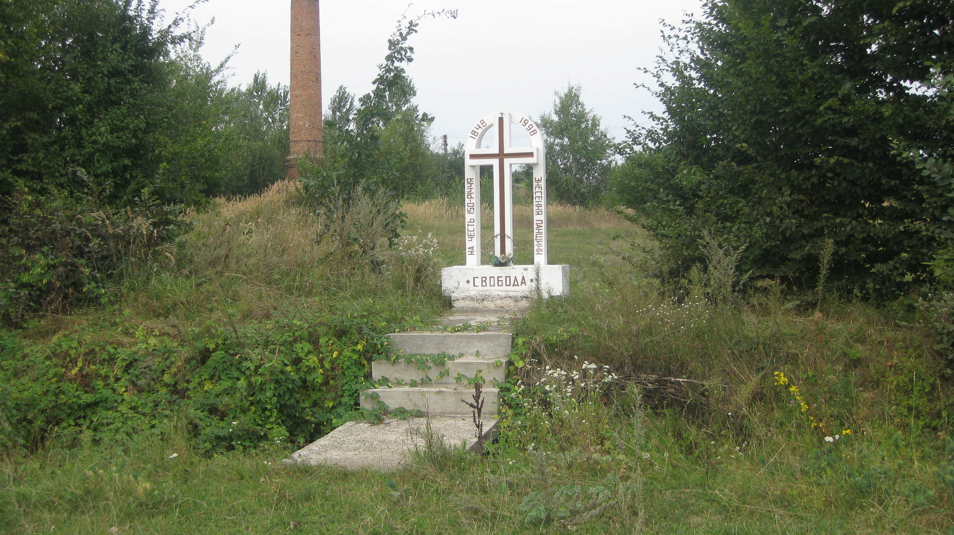 Пам'ятний знак на честь 150-и річчя знесення панщини в смт. Немирів Львівської області, 1998р.